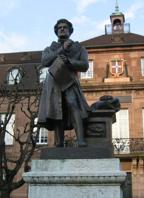 David d'Angers (Français, 1788-1856): Georges Cuvier, statue en pied, 1832/1835, bronze, Montbeliard, Doubs, Franche Comté, France.